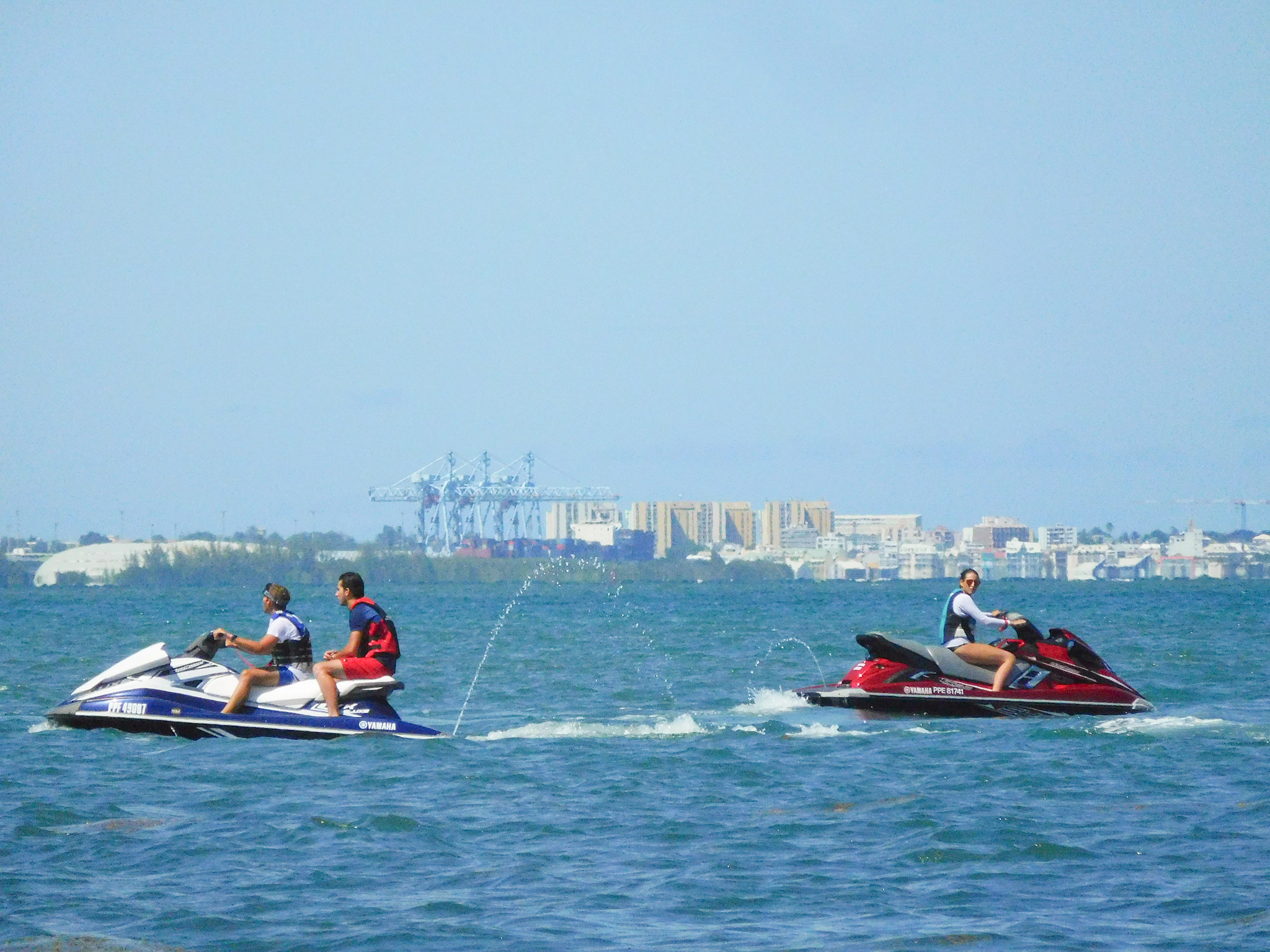 Scooter de mer Sports et loisirs sur l'eau